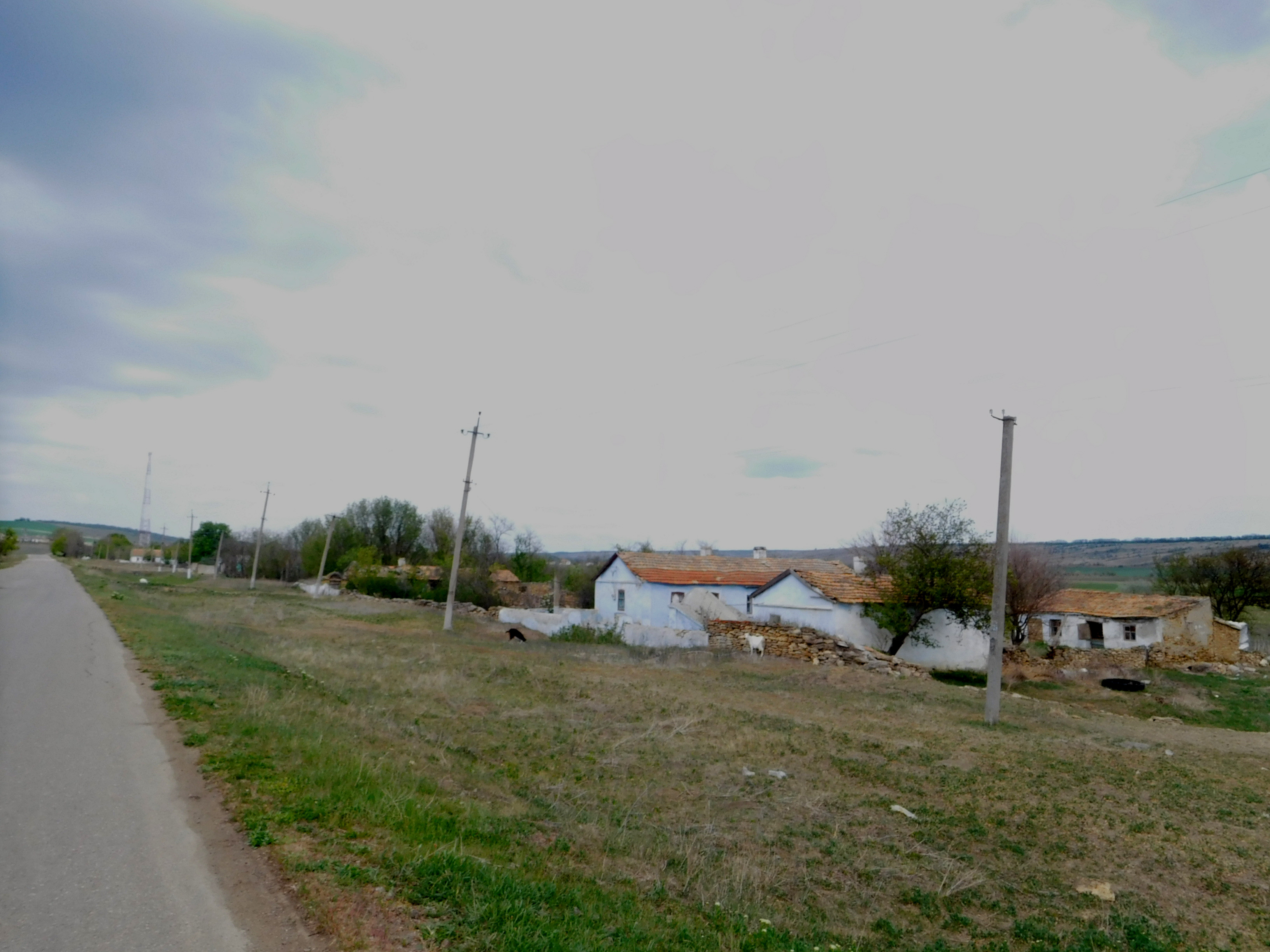 с. Адамівка, Іванівський район, Одеська область